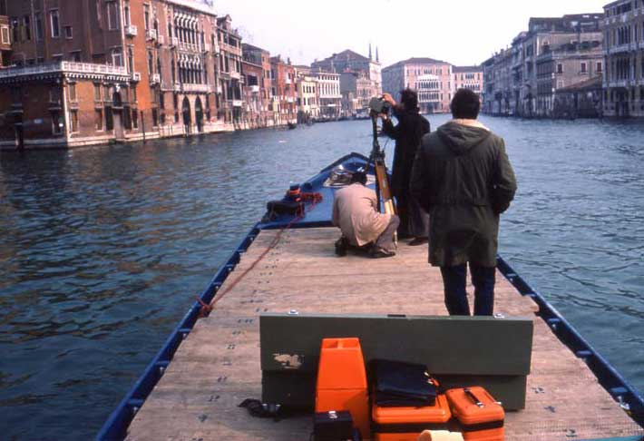 Rilievi fotogrammetrici dell'edilizia veneziana nel 1980